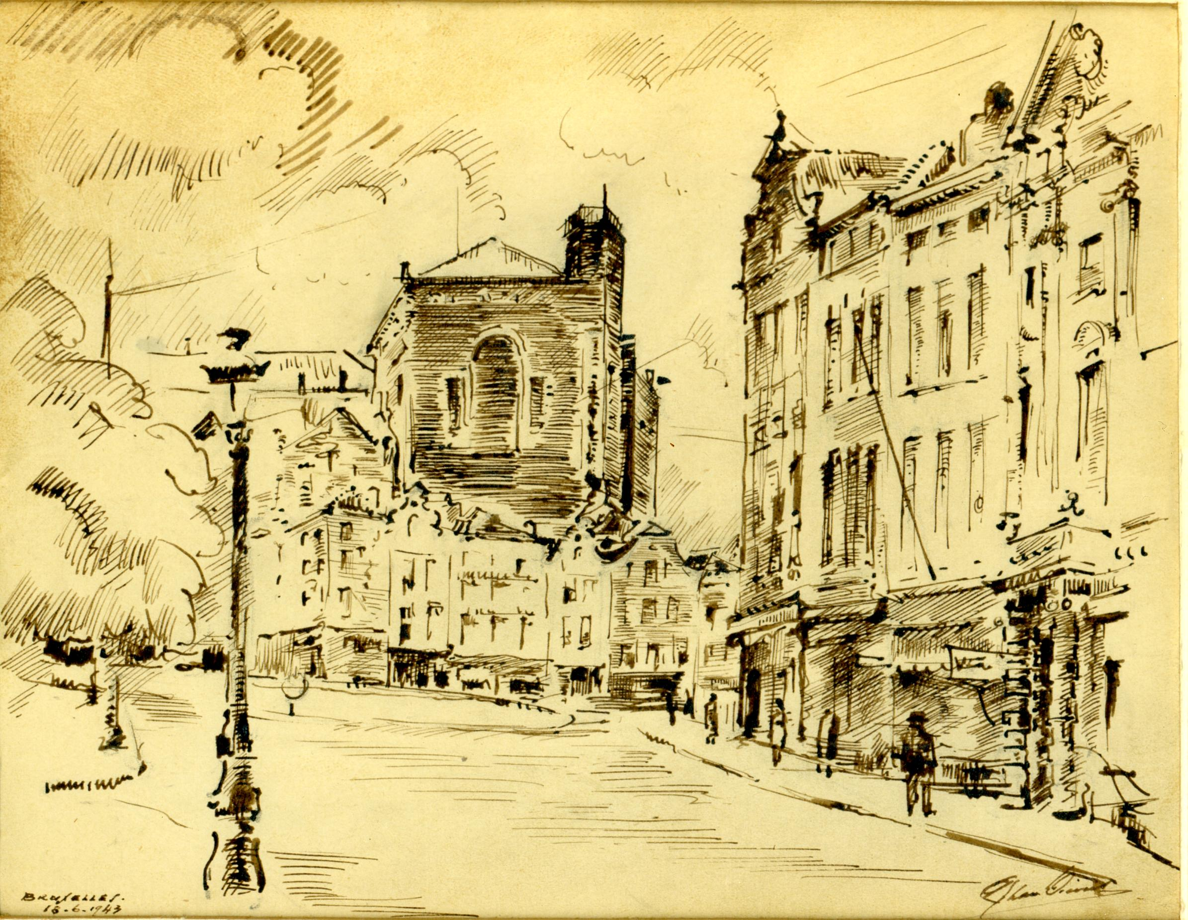 Bruxelles, rue de la Madeleine avec au fond la tour de l'ancienne Bibliothèque Royale, dessin au sépia.